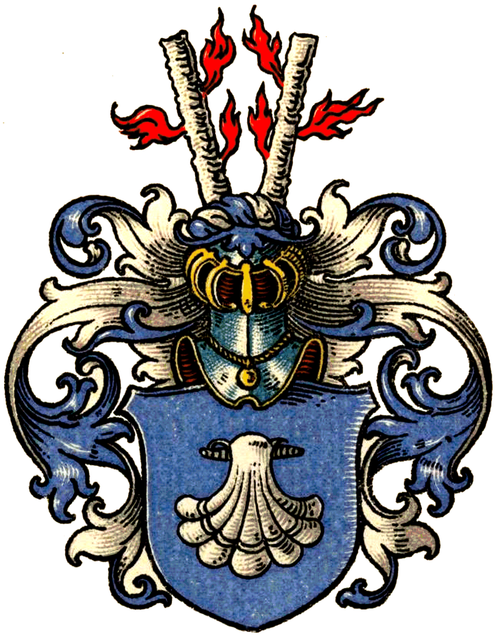 Wappen der Orth ab Hagen